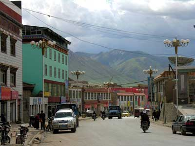 Street scene in Gyêgu (2005)